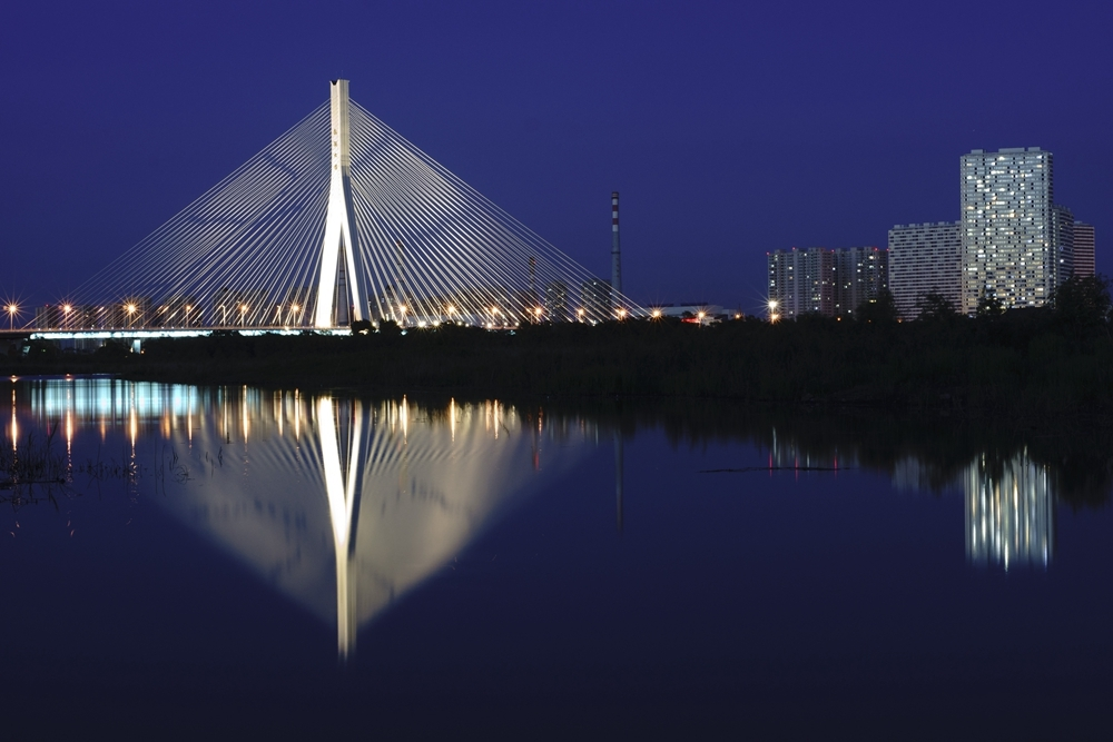 哈尔滨松浦大桥